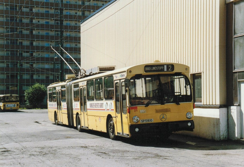 Trolleybus 329 in Bergen (Norwegen) im Busdepot